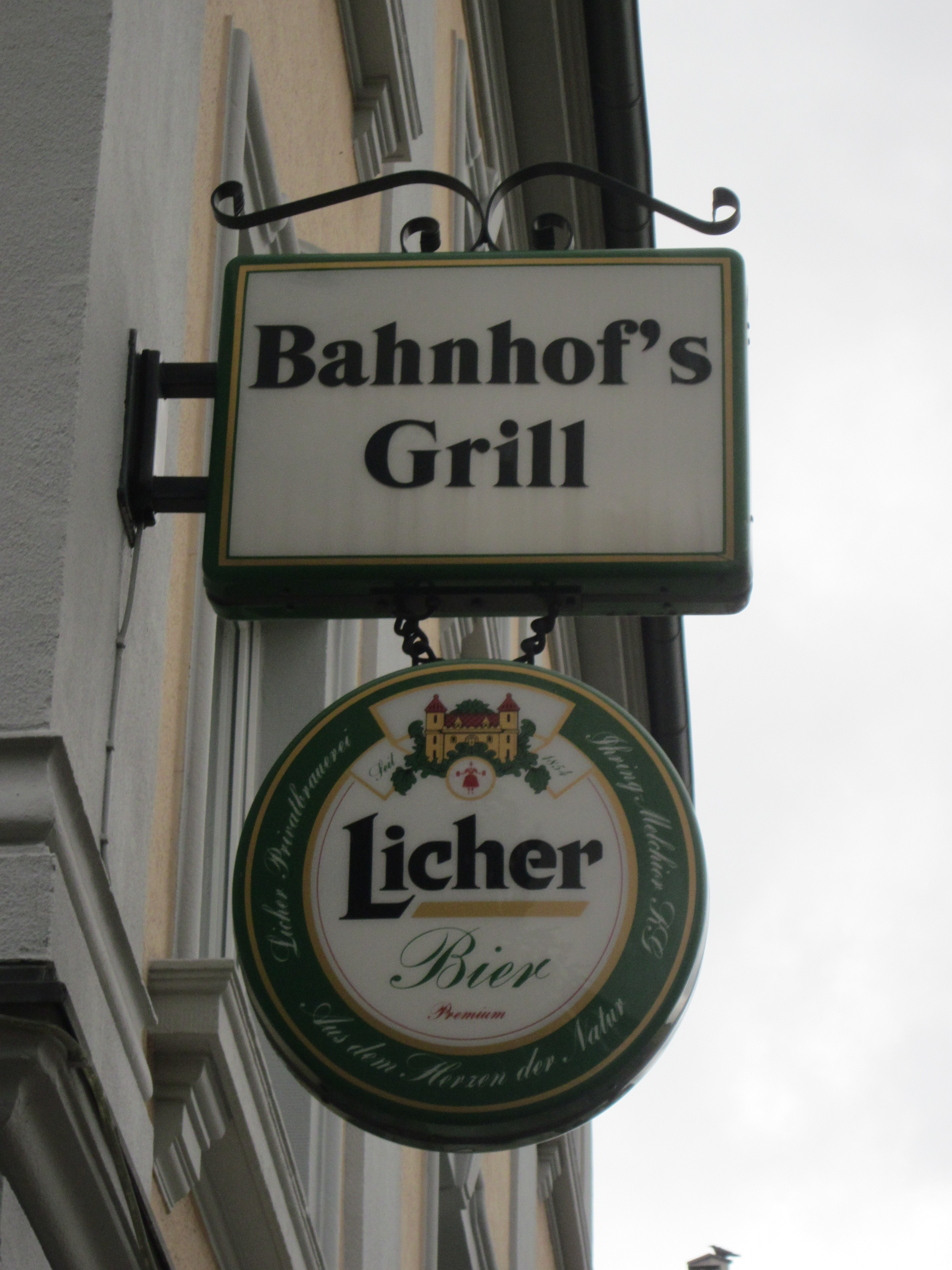 "Bahnhof's Grill" gegenüber dem Bahnhof in Fulda.